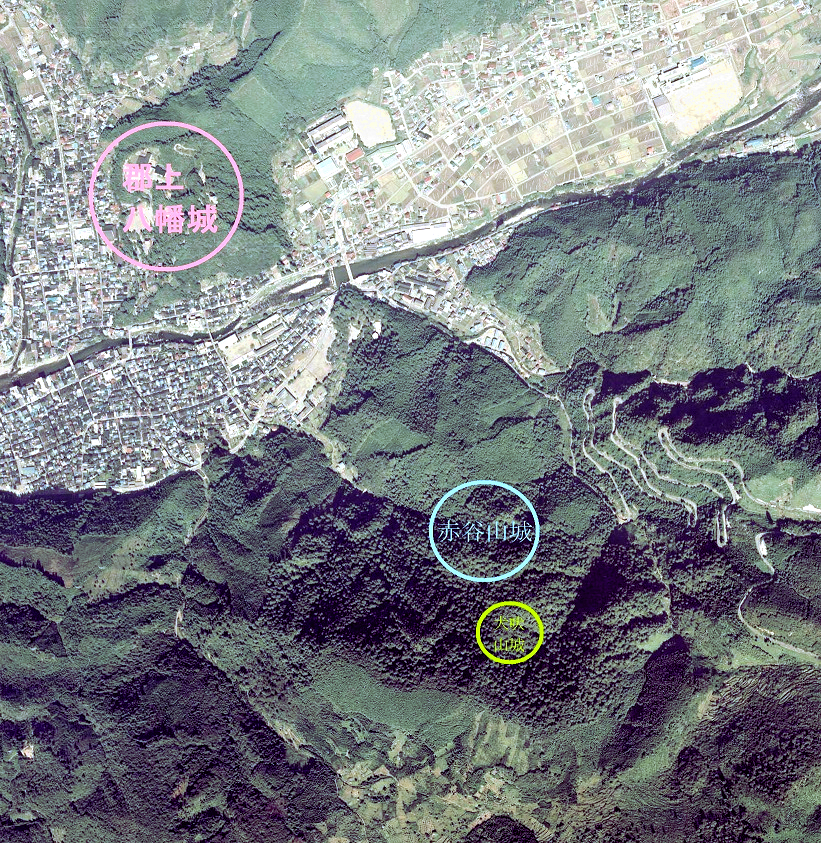 国土地理院撮影の空中写真を元に加工。郡上八幡城・赤谷山城の位置関係を図示。